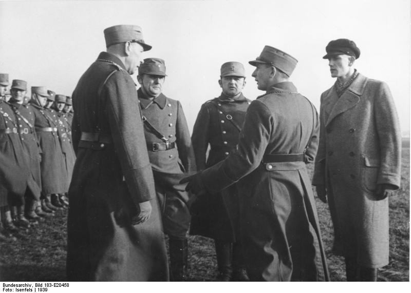 Auf Vorposten an der Memel Memelländische Sicherheitsabteilung bei einer Übung. Auf. Isenfels Scherl Bilderdienst